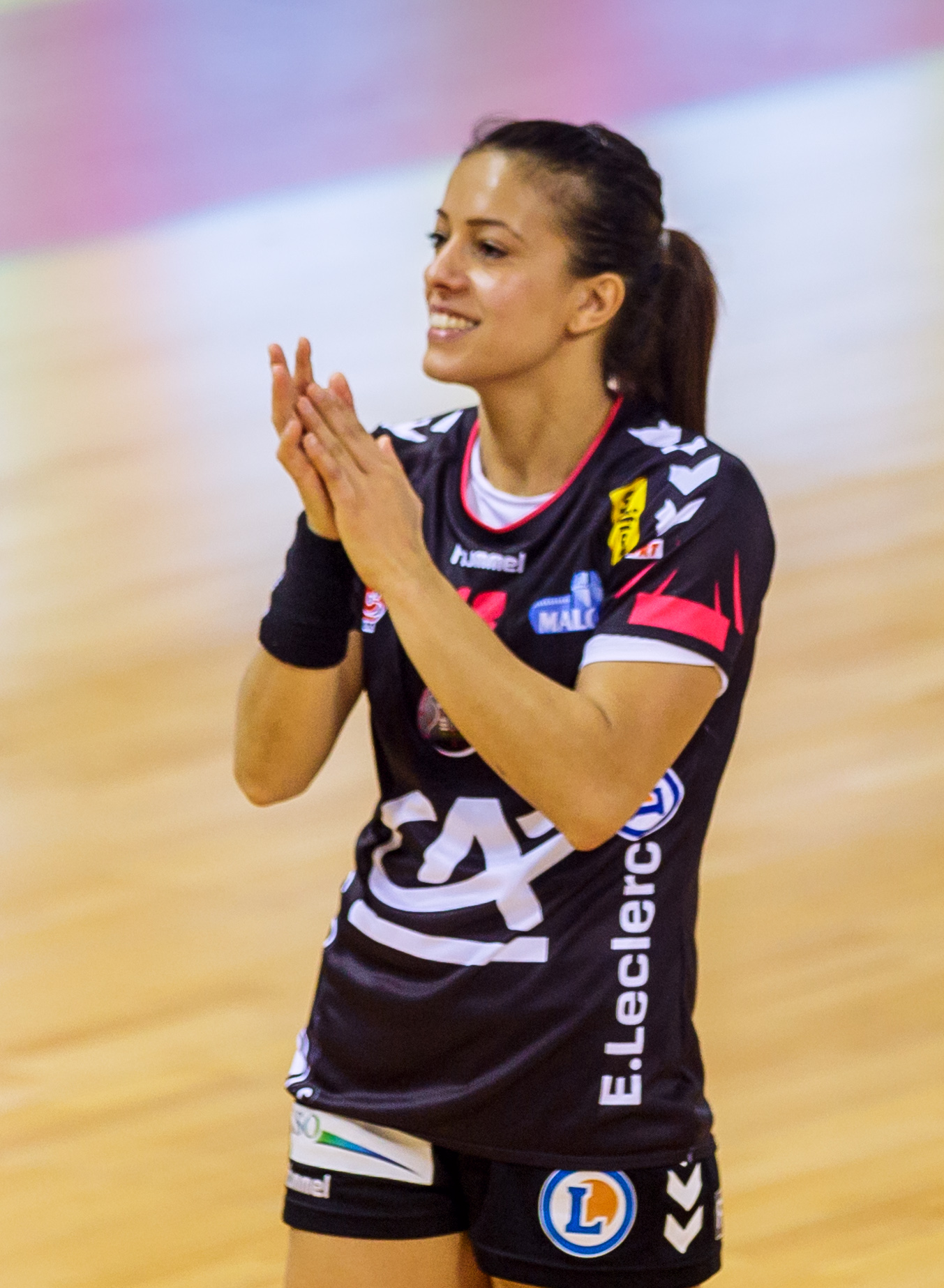 Nabila Tizi. Match de handball du BREST Bretagne Handball à domicile face à Besançon (Entente Sportive Bisontine Féminin) le 16 novembre 2016. La Brest Arena a vu son club l'emporter 24-21.